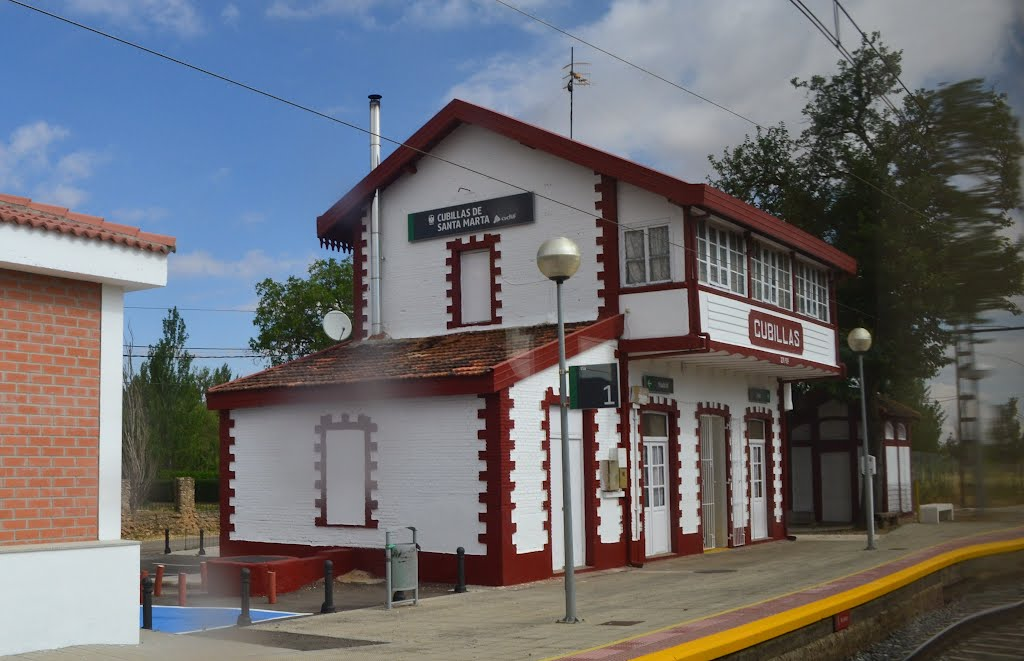 apeadero